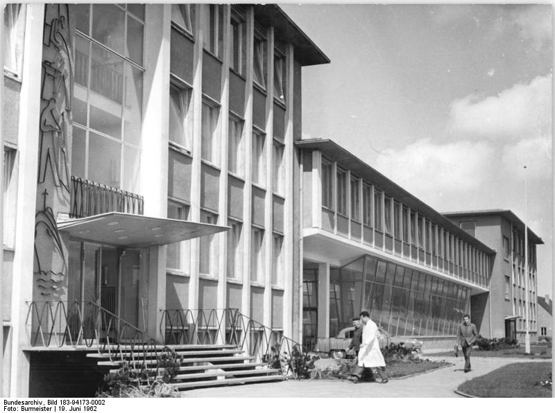 Rostock, Schiffbautechnische Fakultät Zentralbild Burmeister-15.6.1962 Sd-At: Vorbereitung Ostseewoche: Zu den modernsten Bauten Rostocks gehört die Schiffbautechnische Fakultät der Universität Rostock, die einen rieseigen Komplex in der neuen Rostocker Südstadt einnimmt. Die Schiffbautechnische Fakultät ist die größte ihrer Art in Europa und ist mit dem modernsten wissenschaftlichen Geräten für Lehre und Forschung auf dem Gebiet der Schiffbautechnik ausgerüstet, u.a. mit einer Strömungshalle und einem Maschinenprüfstand. UBz: Blick auf einen Gebäudekomplex der Schiffbautechnischen Fakultät Rostock.